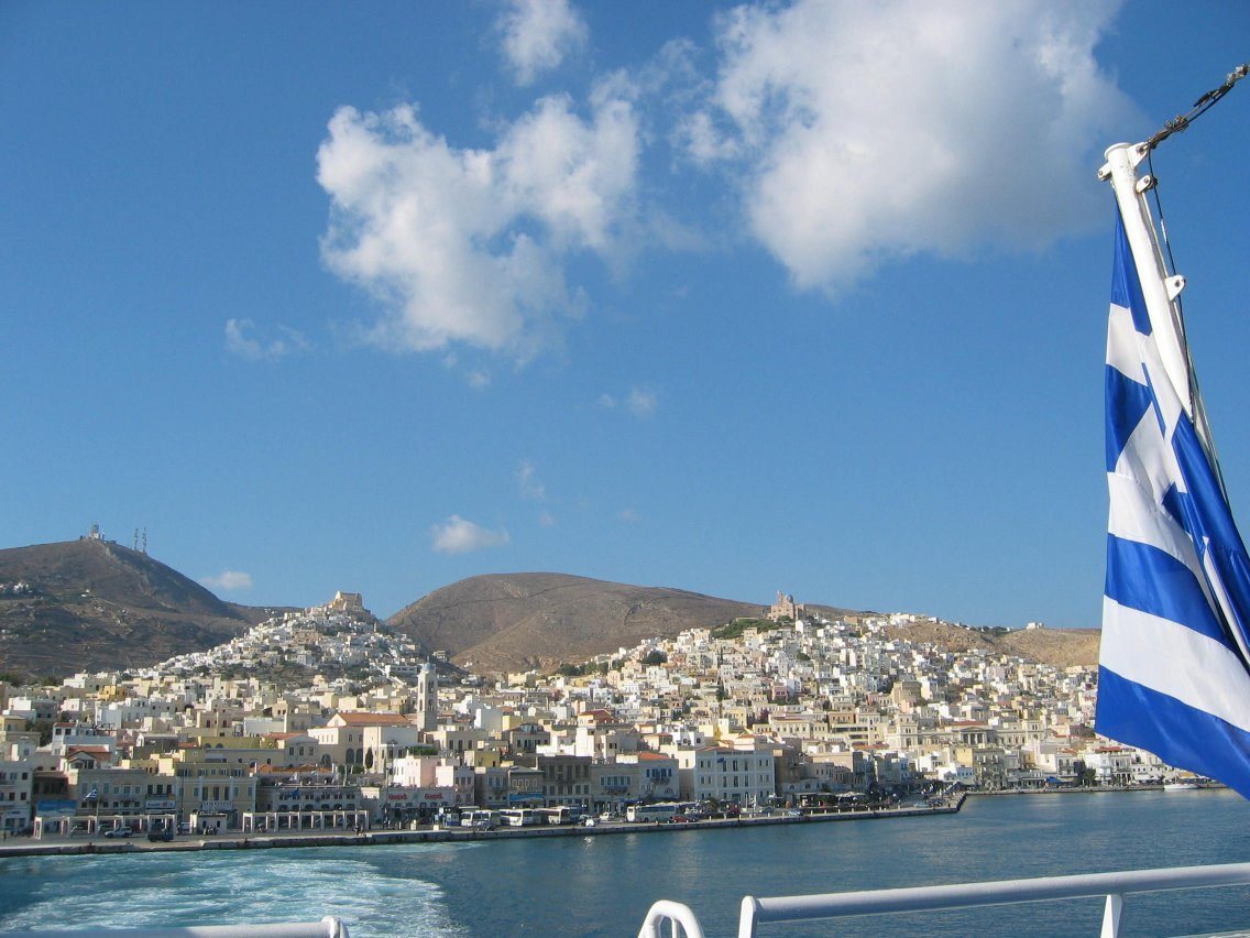 Ermoupolis and Ano Syros on Syros island